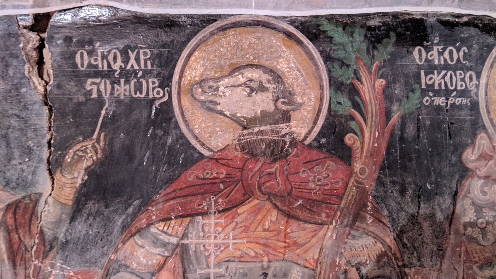 Ο Άγιος Χριστόφορος που παρουσιάζεται ως άνθρωπος με κεφάλι σκύλου στο Άγιο Αθανάσιο Αλεποχωρίου